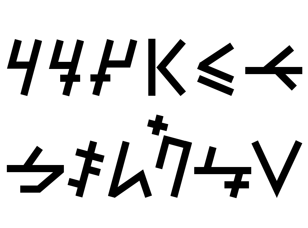 Основные тамги казахского рода шекты (В. В. Востров, М. С. Муканов. Родоплеменной состав и расселение казахов: (Конец XIX- начало XX в.), С. 104).